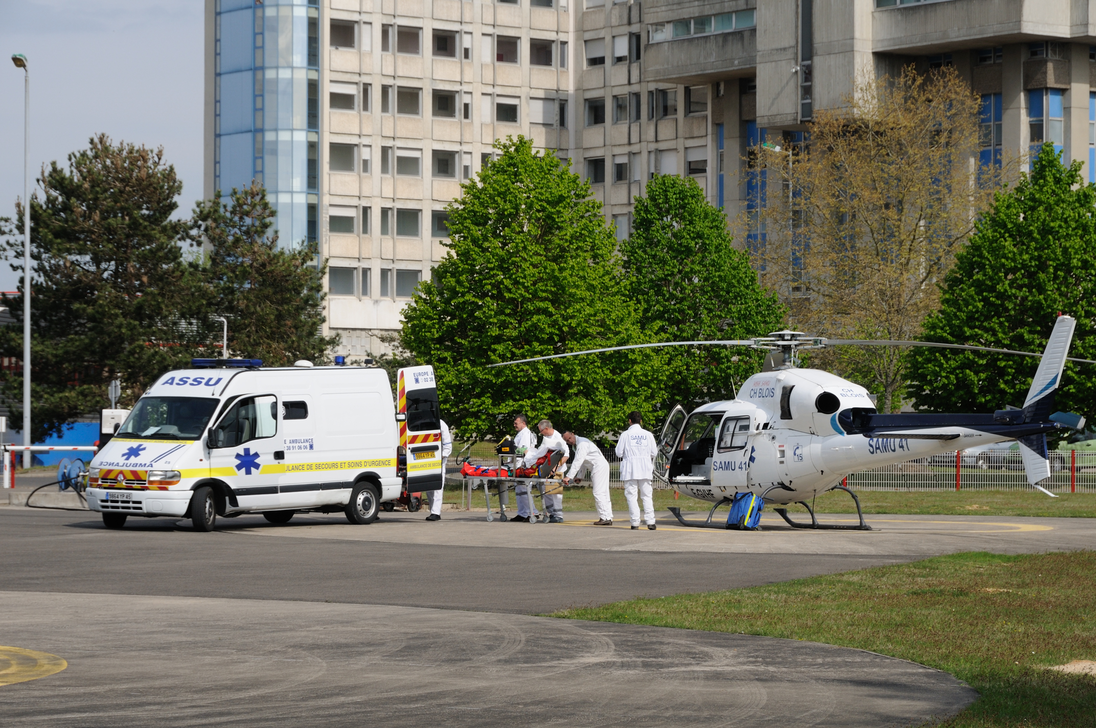 Hélicoptère du SAMU 41 (Centre Hospitalier de Blois), Hôpital d'Orléans-la-Source, Loiret, France Modèle : Eurocopter AS 355 N (F-GVHF)